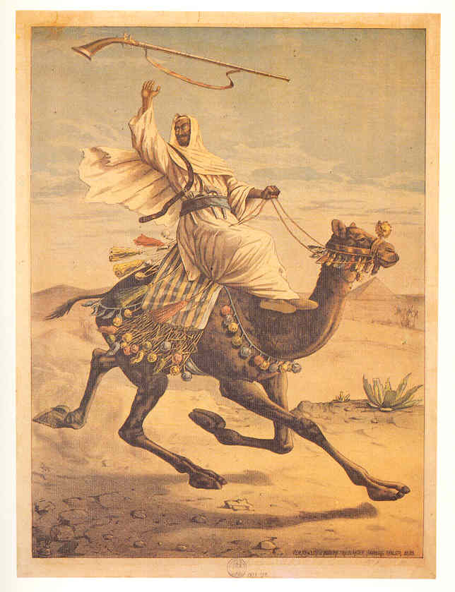 Plakat ür eine Nubier-Völkerschau bei Carl Hagenbeck Farblithographie